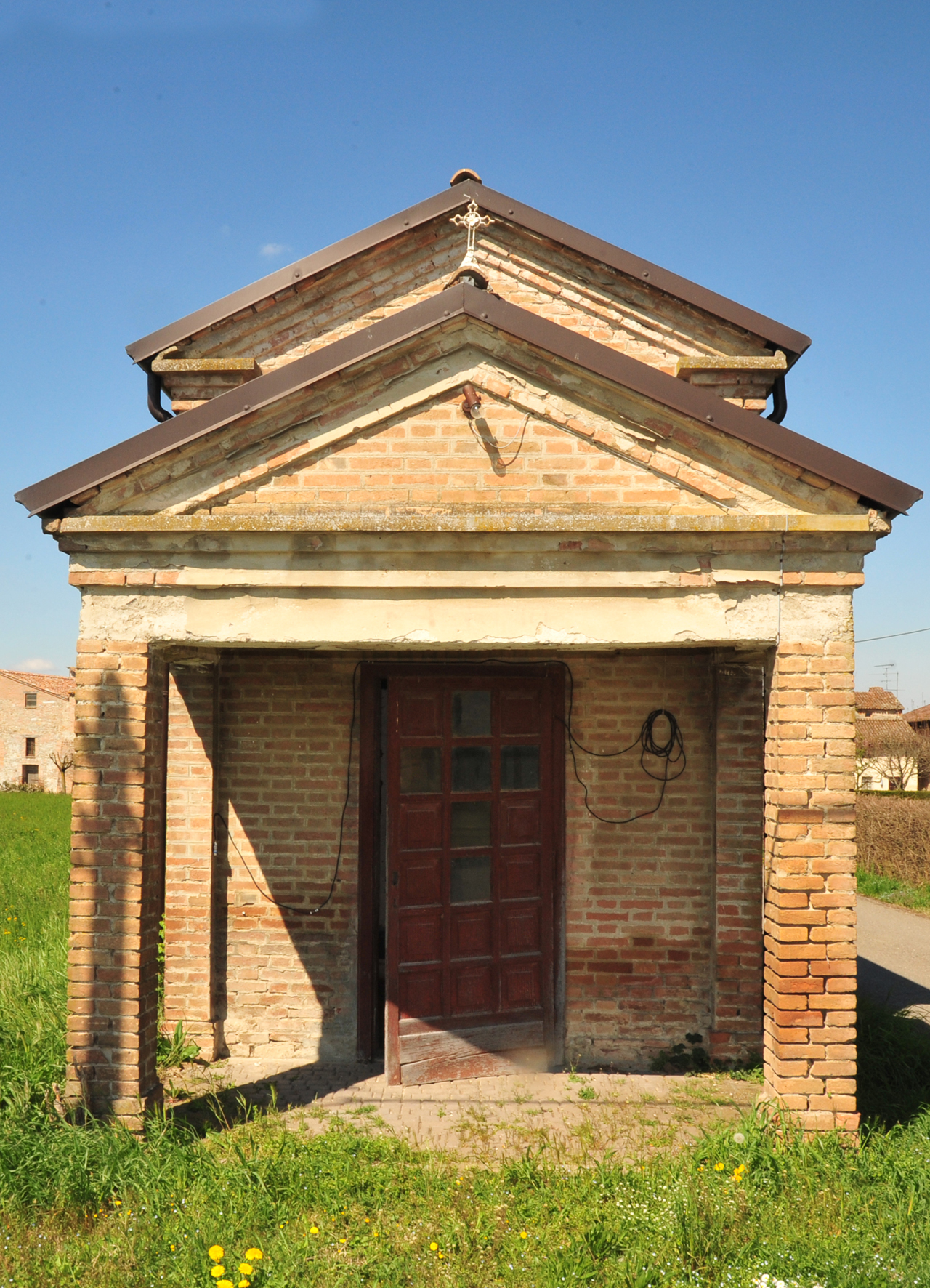 Frascale 3